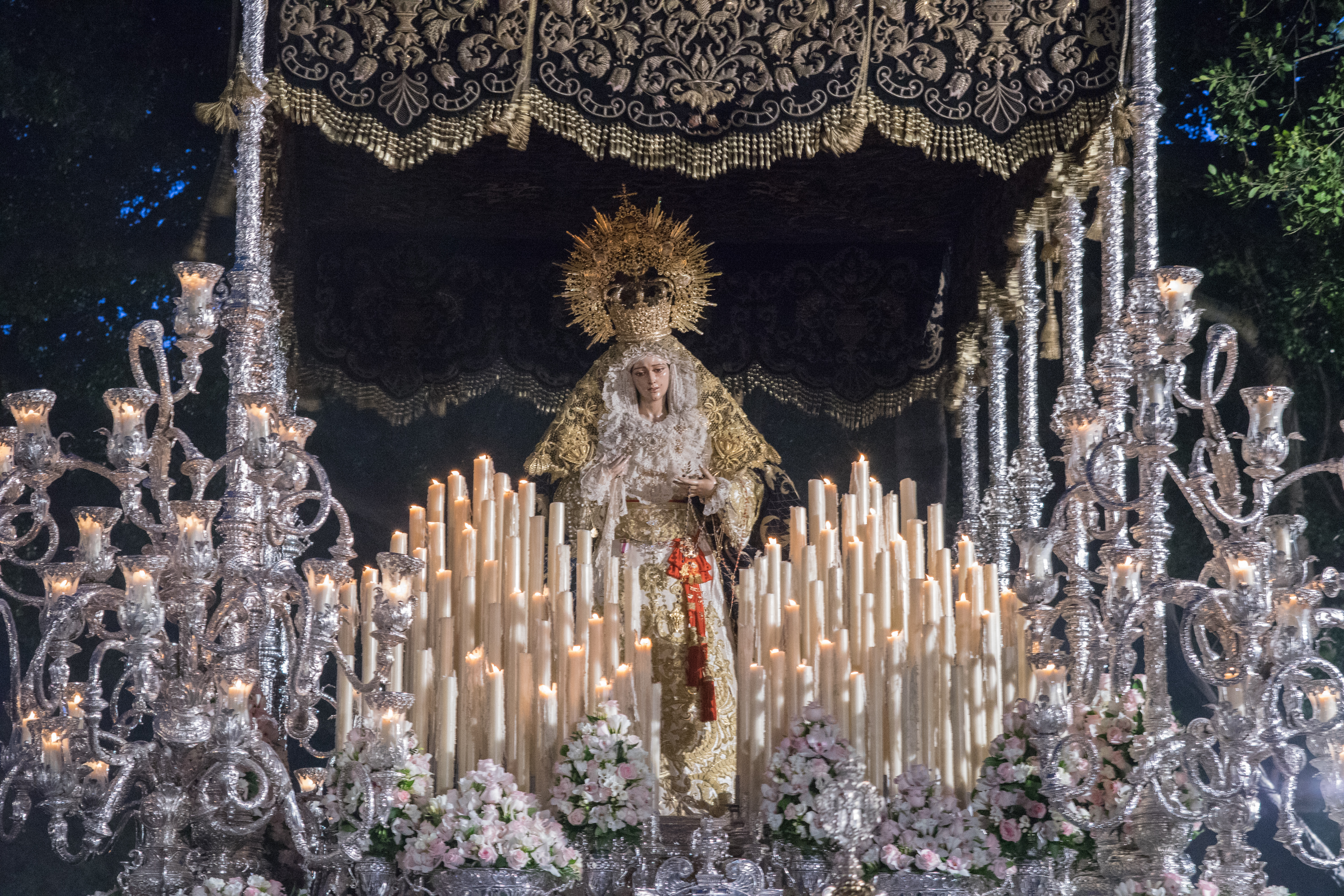 Trono de la Paz de la Real y Muy Ilustre Hermandad de la Sagrada Cena Sacramental y María Santísima de la Paz This is a photography of a Folklore festival in Spain (Wikidata id Q9075883).